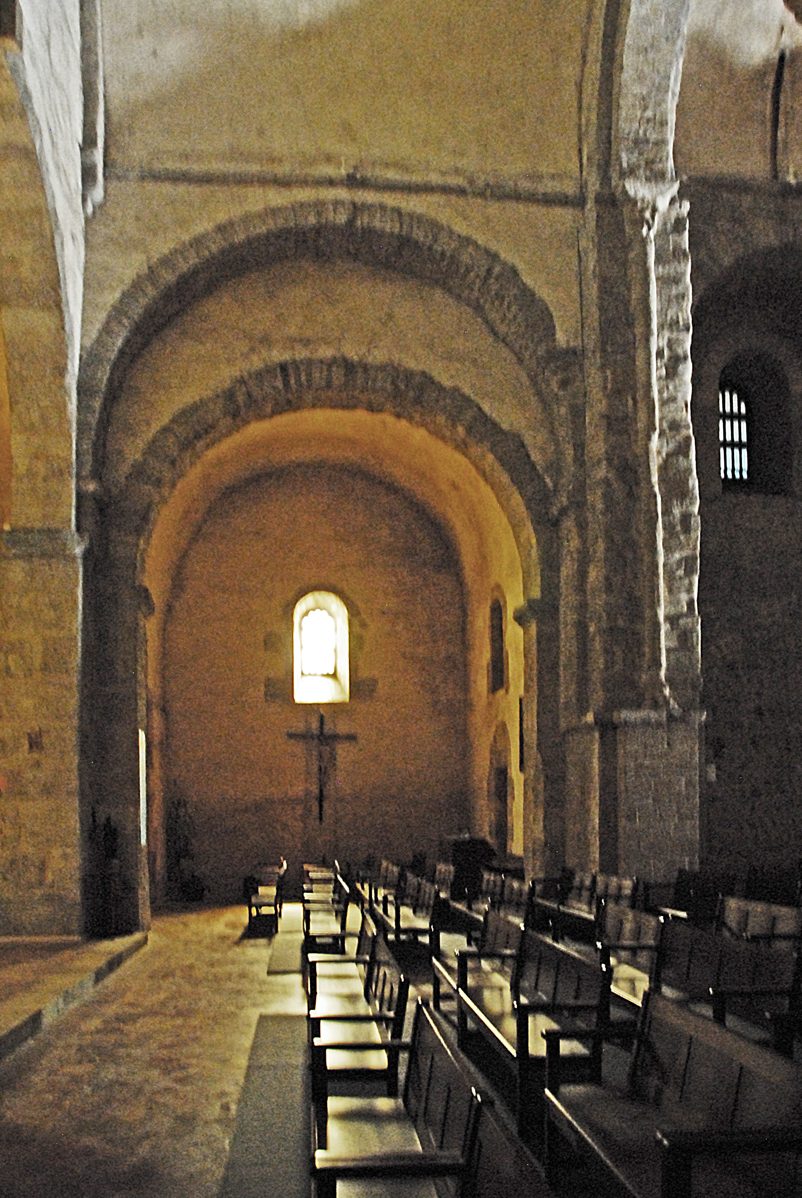 St-André-de-Sorède, aus Vierung in südl. Querhausarm